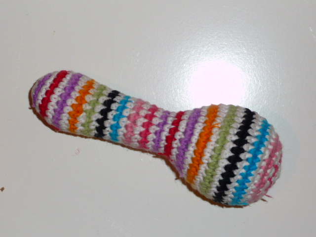 Sonajero de tela